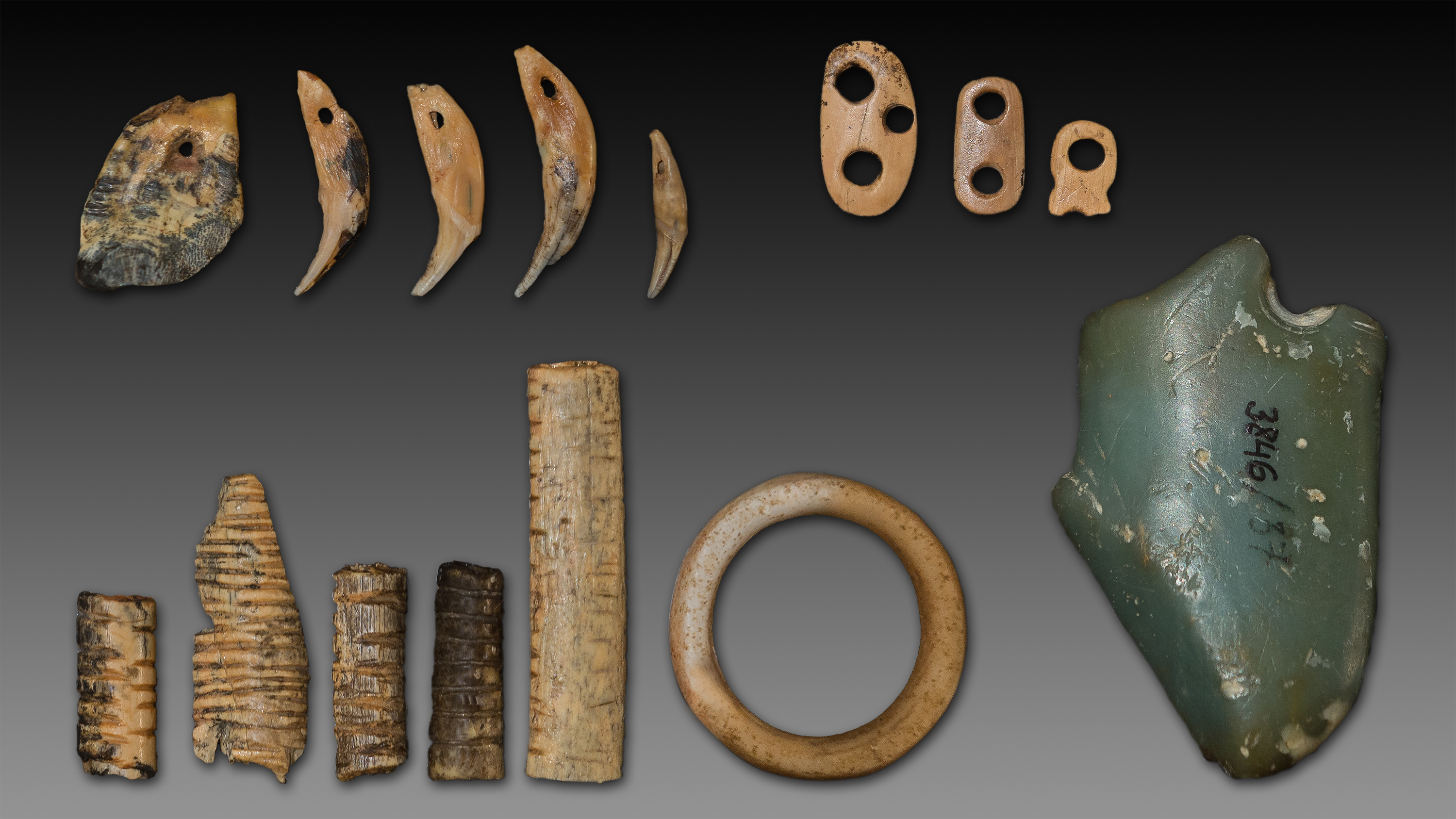 Ring, Anhänger, Perlen und gekerbte Knochenartefakte aus der Denisova-Höhle. Originale, ausgestellt in der Sonderausstellung "Le troisième Homme" (30. Juni 2017 bis 13. November 2017) im Musée national de Préhistoire in Les Eyzies-de-Tayac, Frankreich.